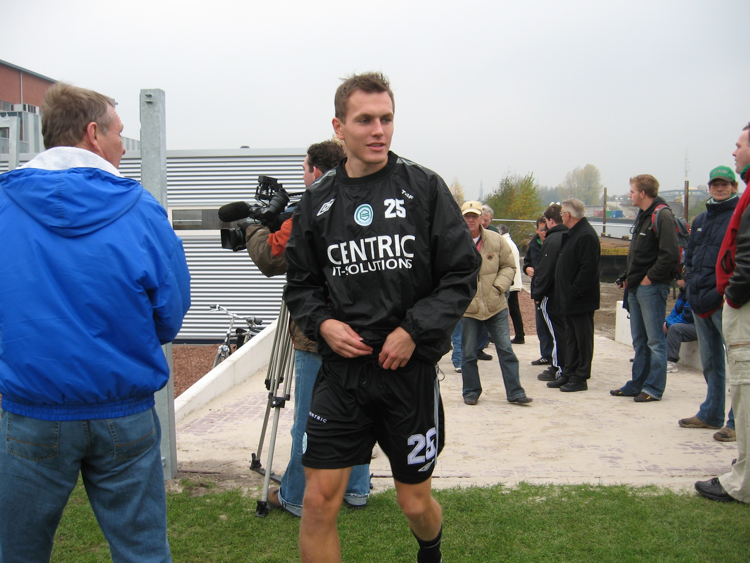 FC Groningen-speler Ondrej Svejdik